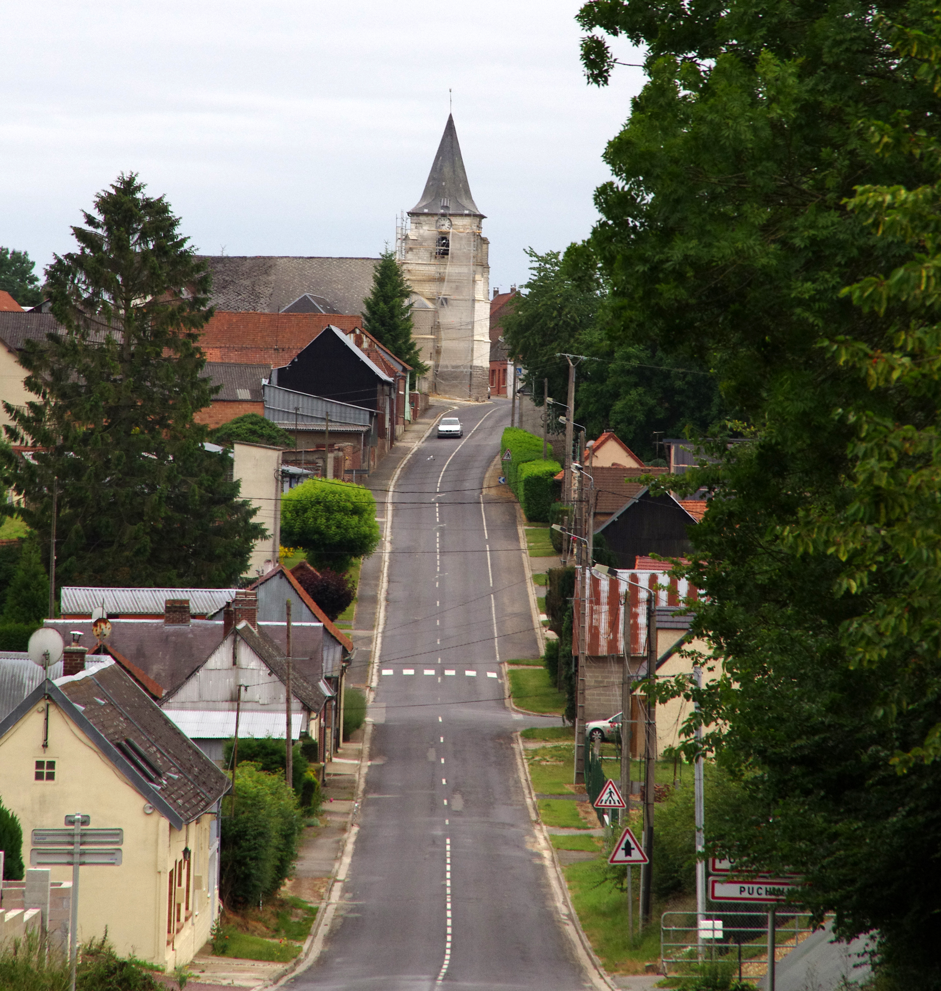 Puchevillers (Somme, France) - L'église est juste sur le côté de la route qui traverse le village. .